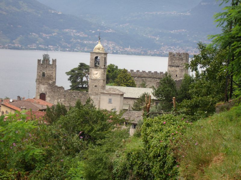 Plinio